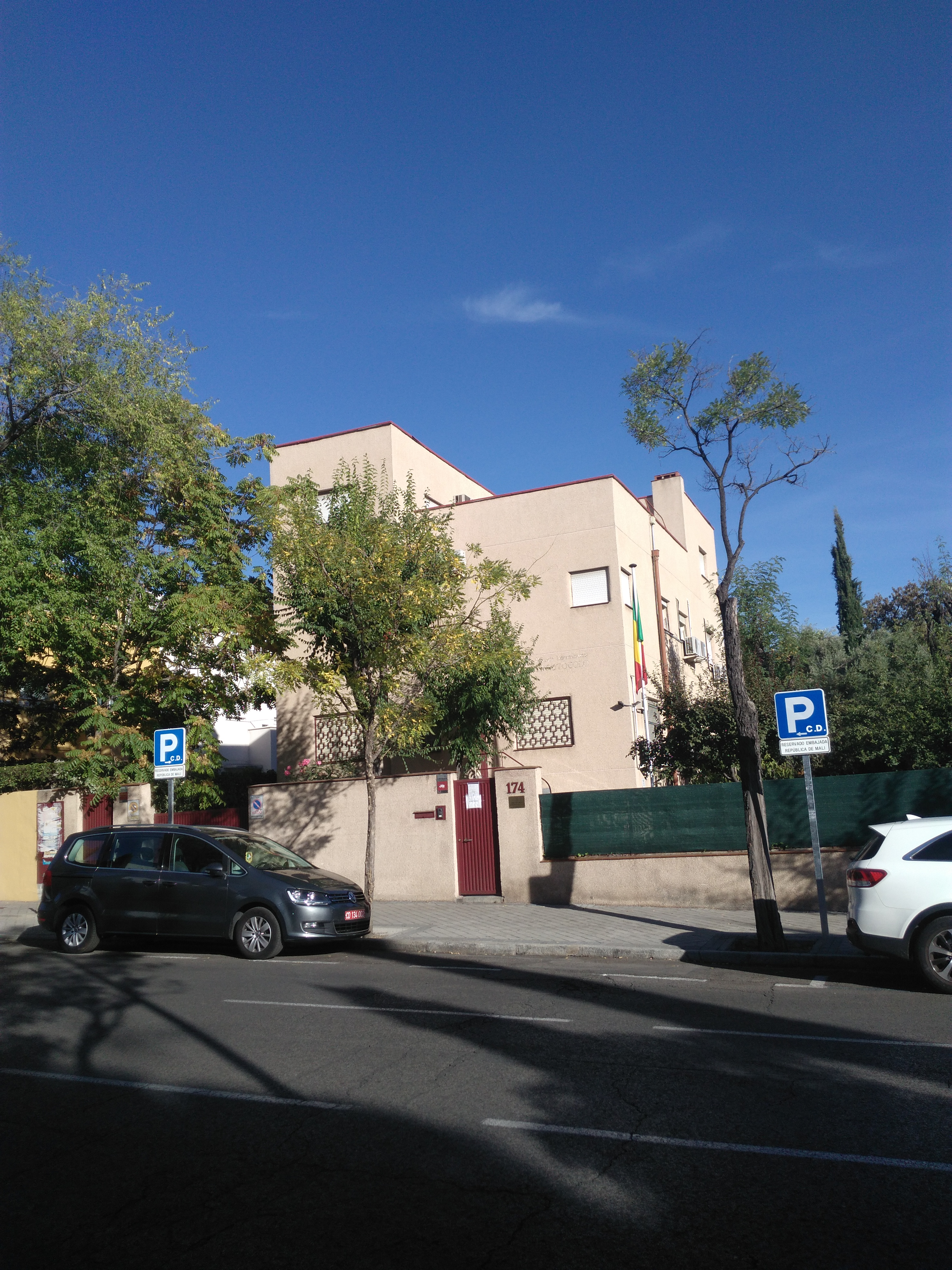 Embajada de Mali en España, calle de Serrano nº 174, Madrid.